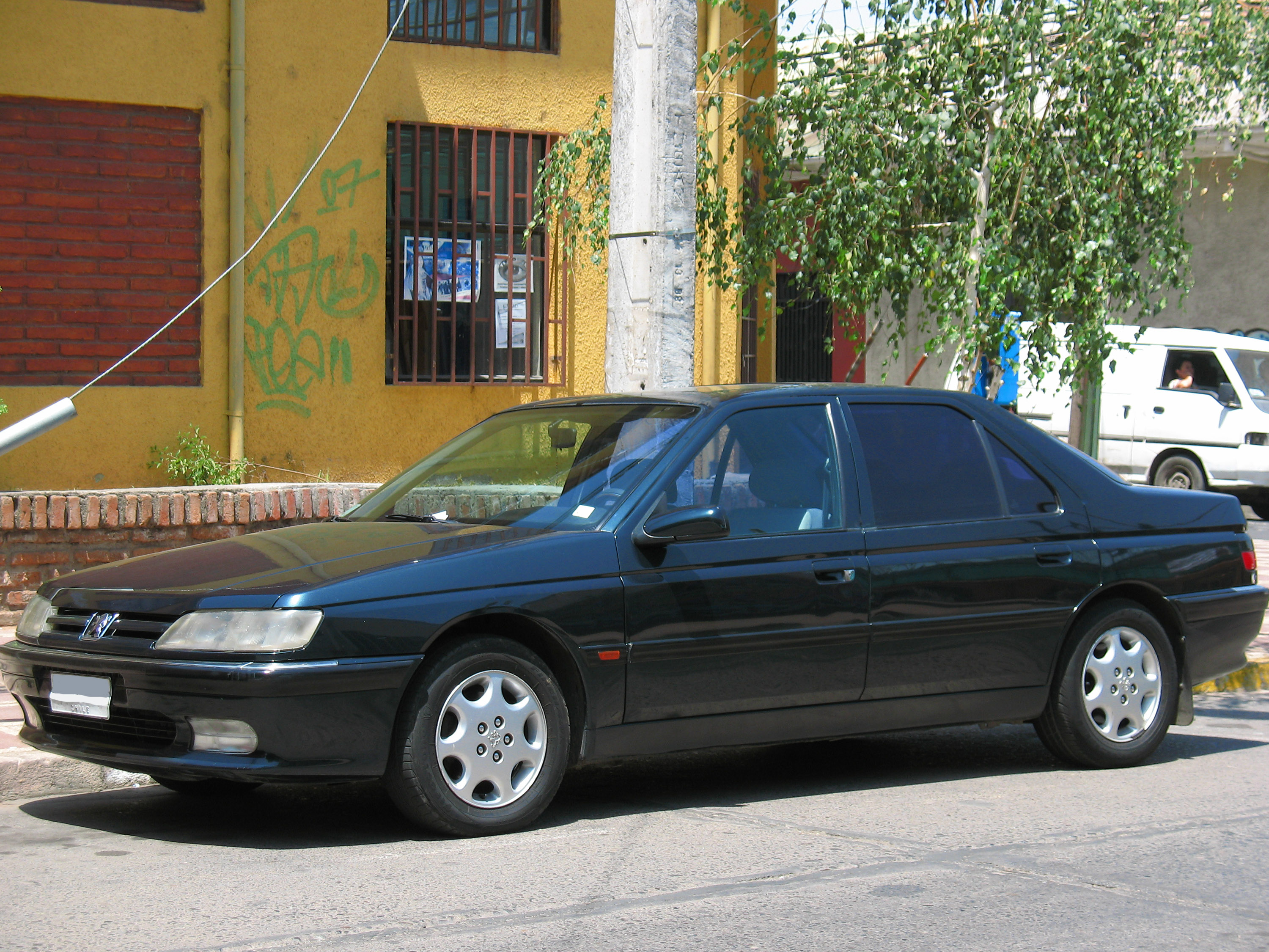 Peugeot 605 2.0 SRi 1995